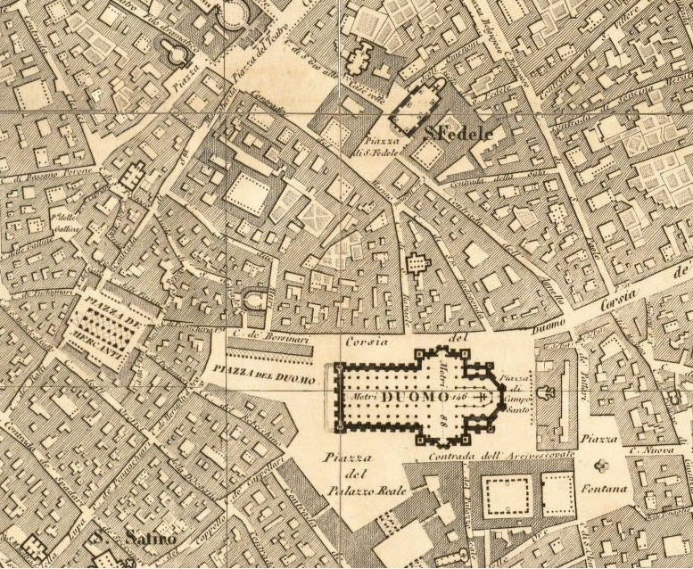 Versiona ricomposta di questa mappa